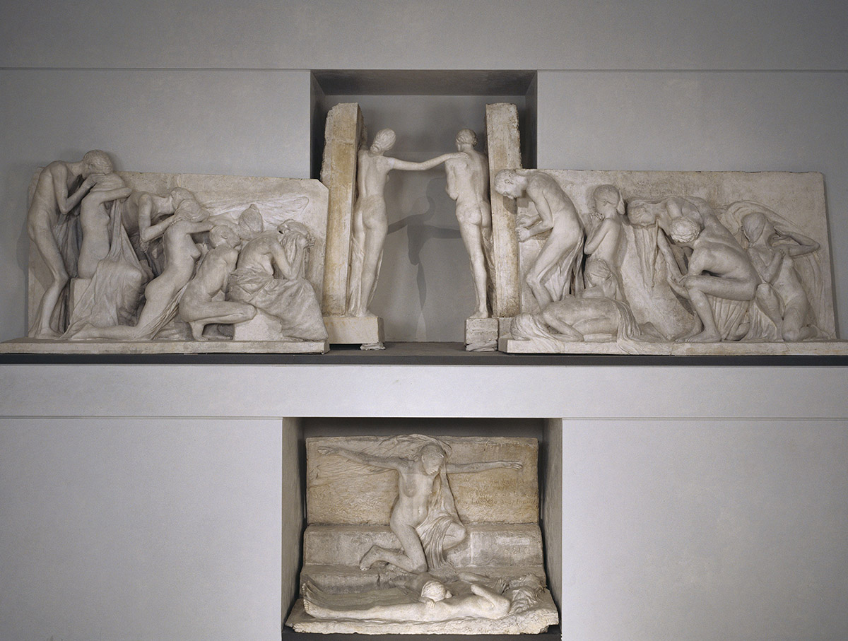 Albert Bartholomé, Monument aux Morts, 1895-1899. Plâtre modèle pour le cimetière du Père Lachaise, Lyon